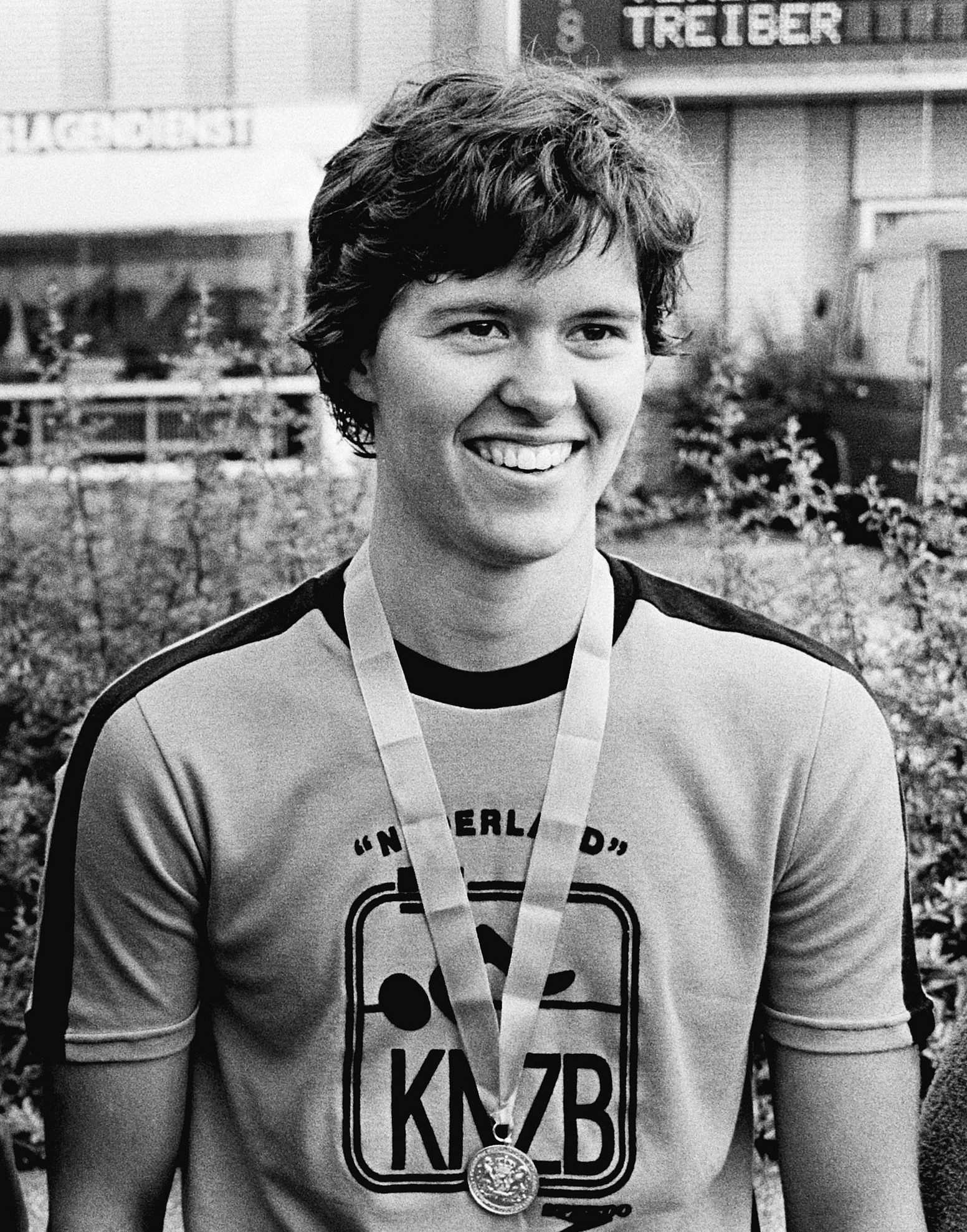 Monique Bosga